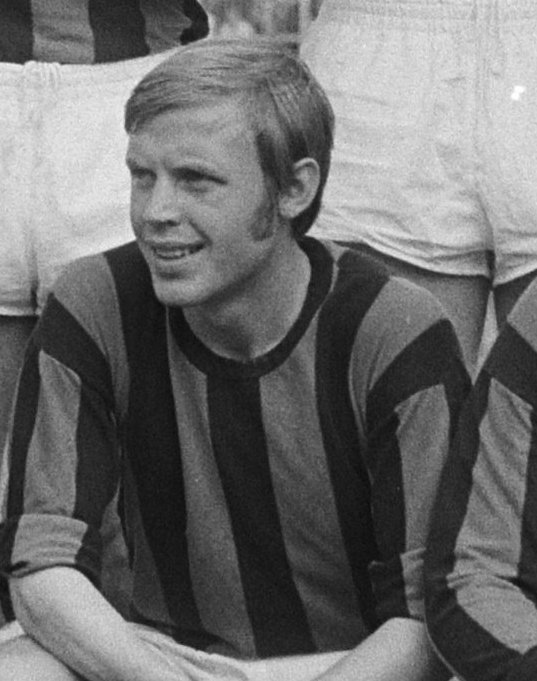 Collectie / Archief : Fotocollectie Anefo Reportage / Serie : DWS-FC Twente 1-3 Beschrijving : Het elftal van DWS, staand vlnr, Flinkevleugel, Soetekouw, Pijlman, Dijkstra, Overweg, Jongbloed, zittend vlnr, Smit, Geurtsen, Van der Vall, Seemann, Rensenbrink Datum : 18 augustus 1968 Locatie : Amsterdam, Noord-Holland Trefwoorden : elftallen, groepsportretten, sport, voetbal Persoonsnaam : Dijkstra, Jos, Flinkevleugel, Frits, Geurtsen, Frans, Jongbloed, Jan, Overweg, Niels, Pijlman, André, Rensenbrink, Rob, Seemann, Finn, Smit, Aad, Soetekouw, Frits, Vall, Kick van der Fotograaf : Fotograaf Onbekend / Anefo Auteursrechthebbende : Nationaal Archief Materiaalsoort : Negatief (zwart/wit) Nummer archiefinventaris : bekijk toegang 2.24.01.05 Bestanddeelnummer : 921-6055